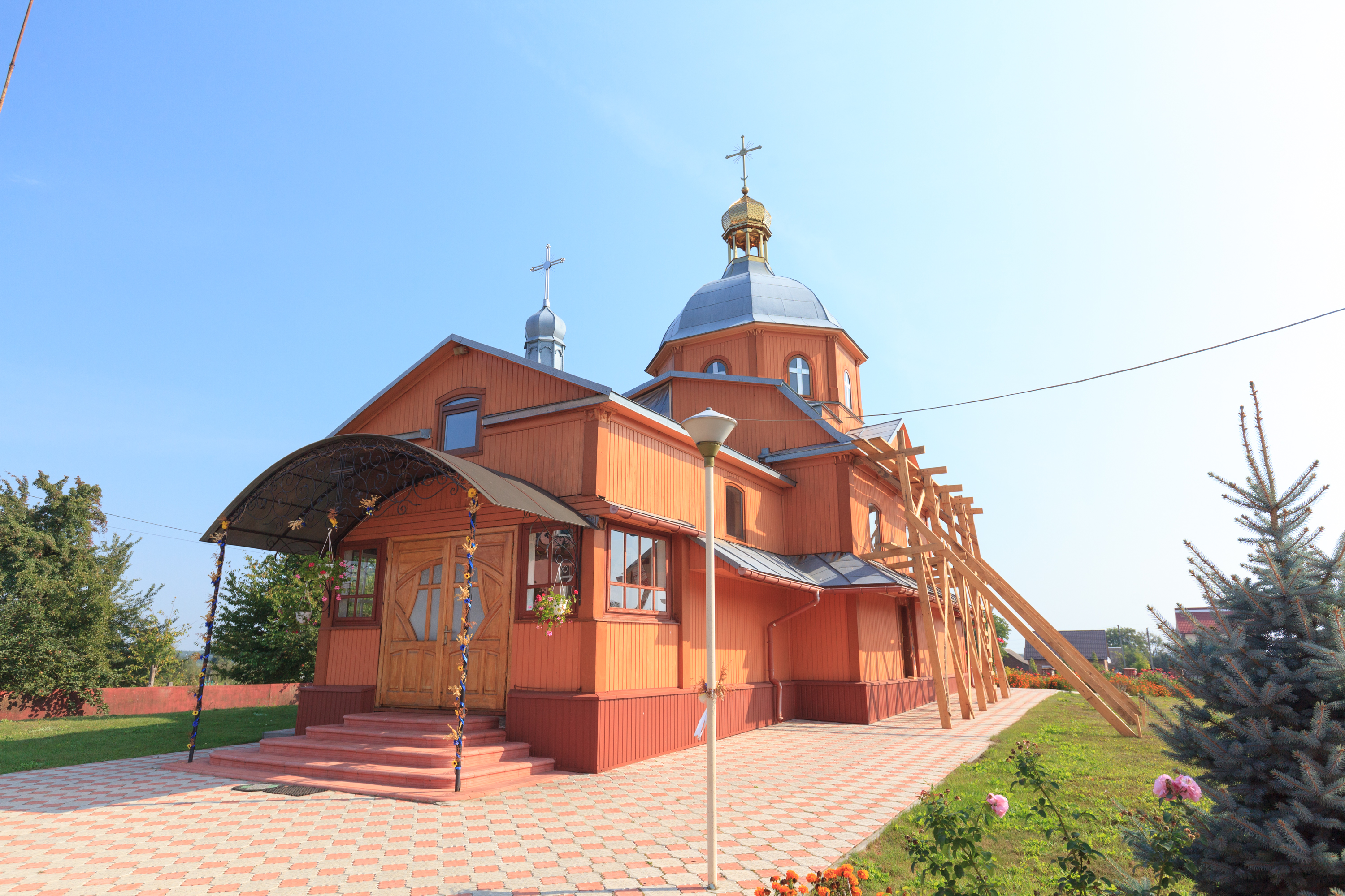 Церква Різдва Пресвятої Богородиці(дер.), с.Глиниці